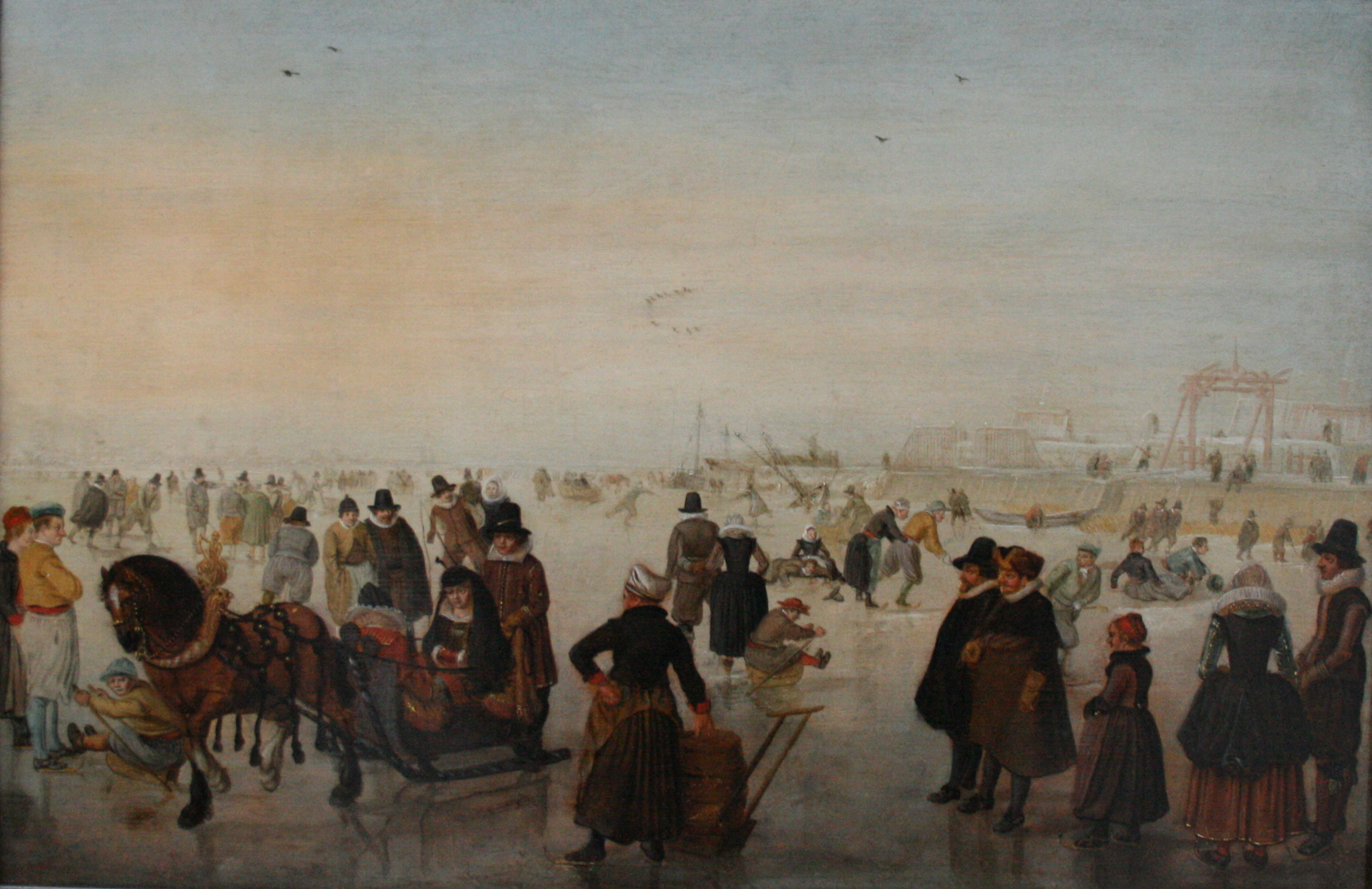 IJsgezicht - Ice scene